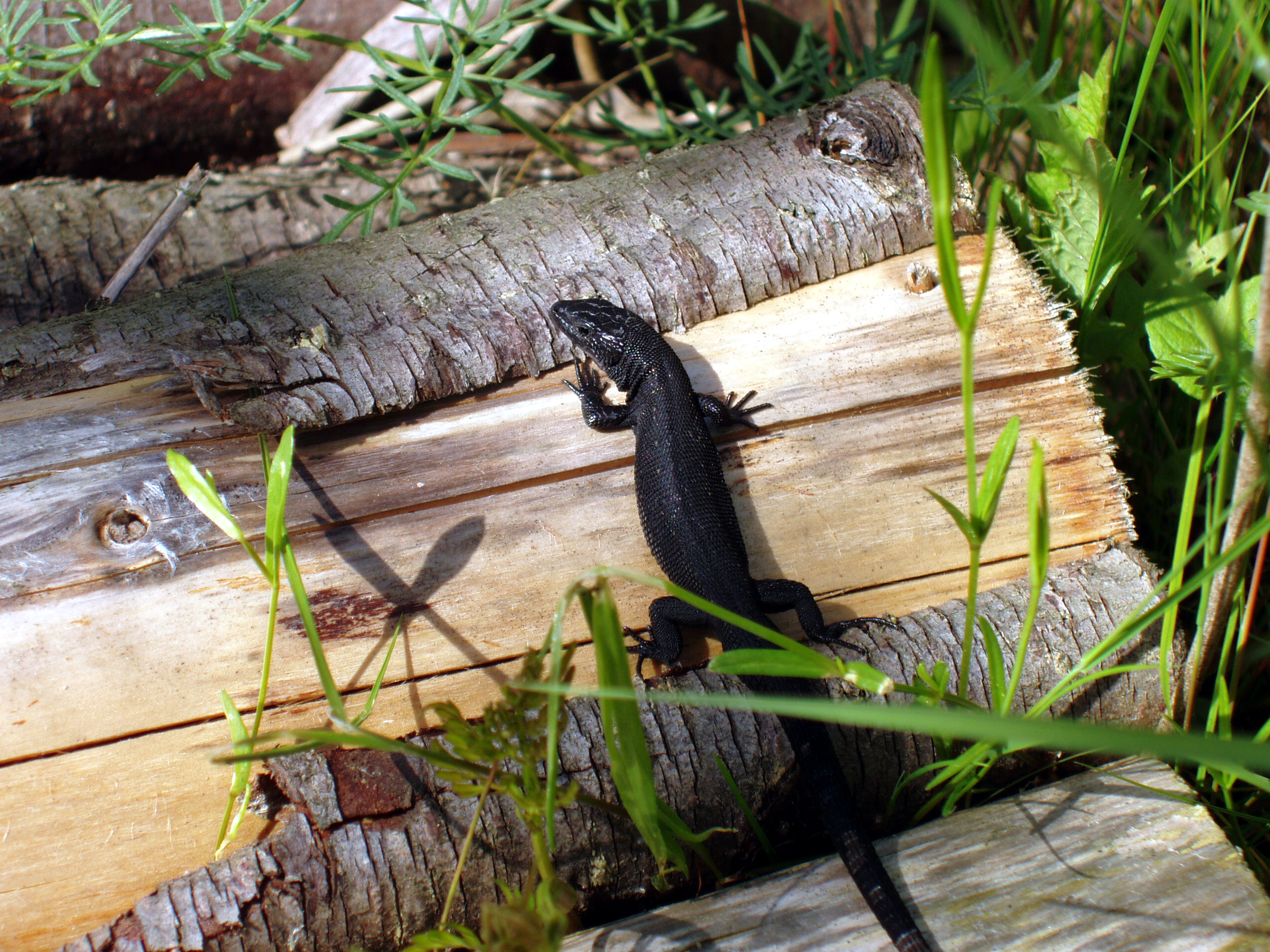 Waldeidechse (melanistisch) am Schwarzen See (Schlemmin, Bernitt, Mecklenburg-Vorpommern)